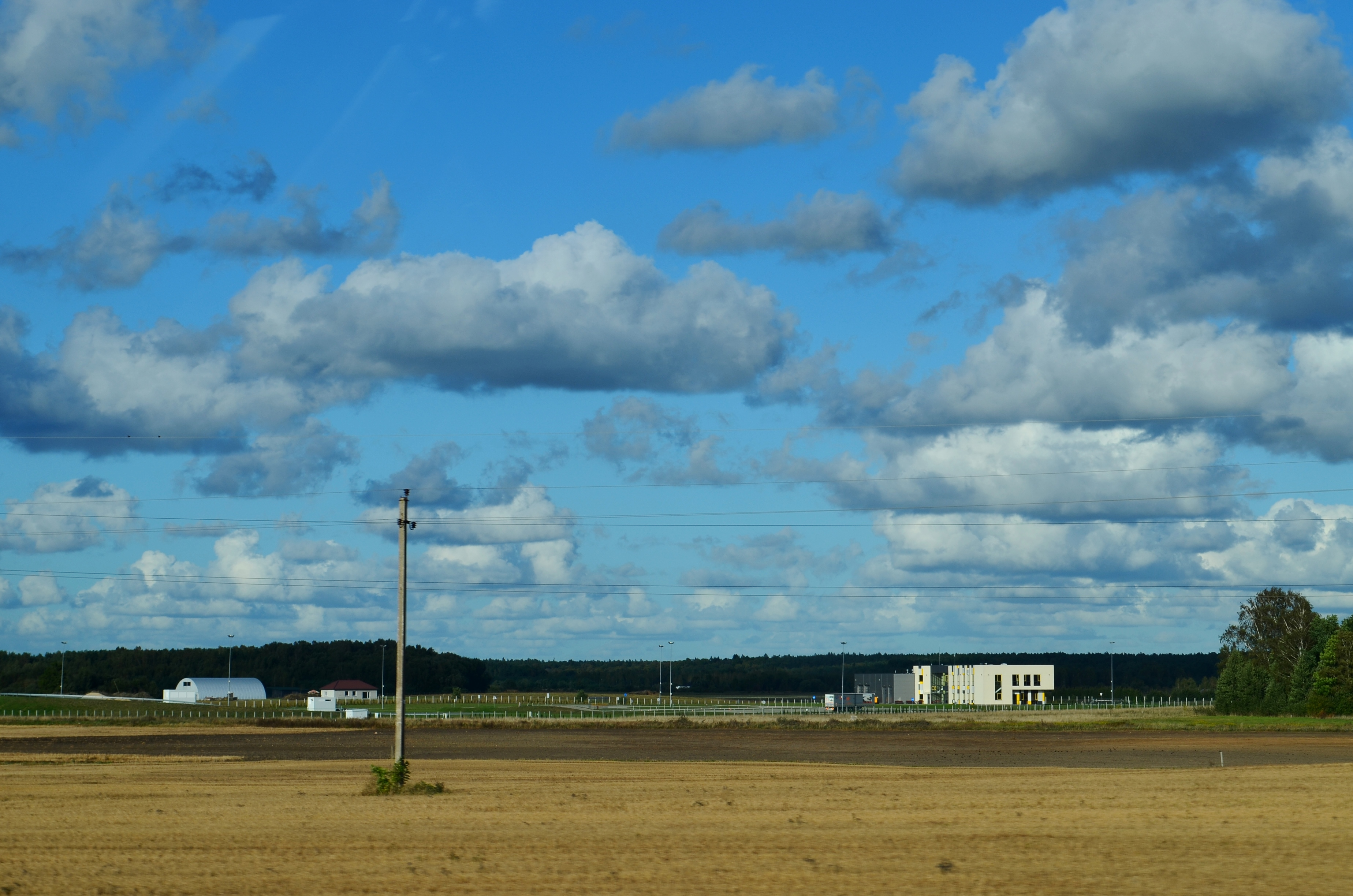 Pramoninė sritis, Ketvergių k., Klaipėdos raj.